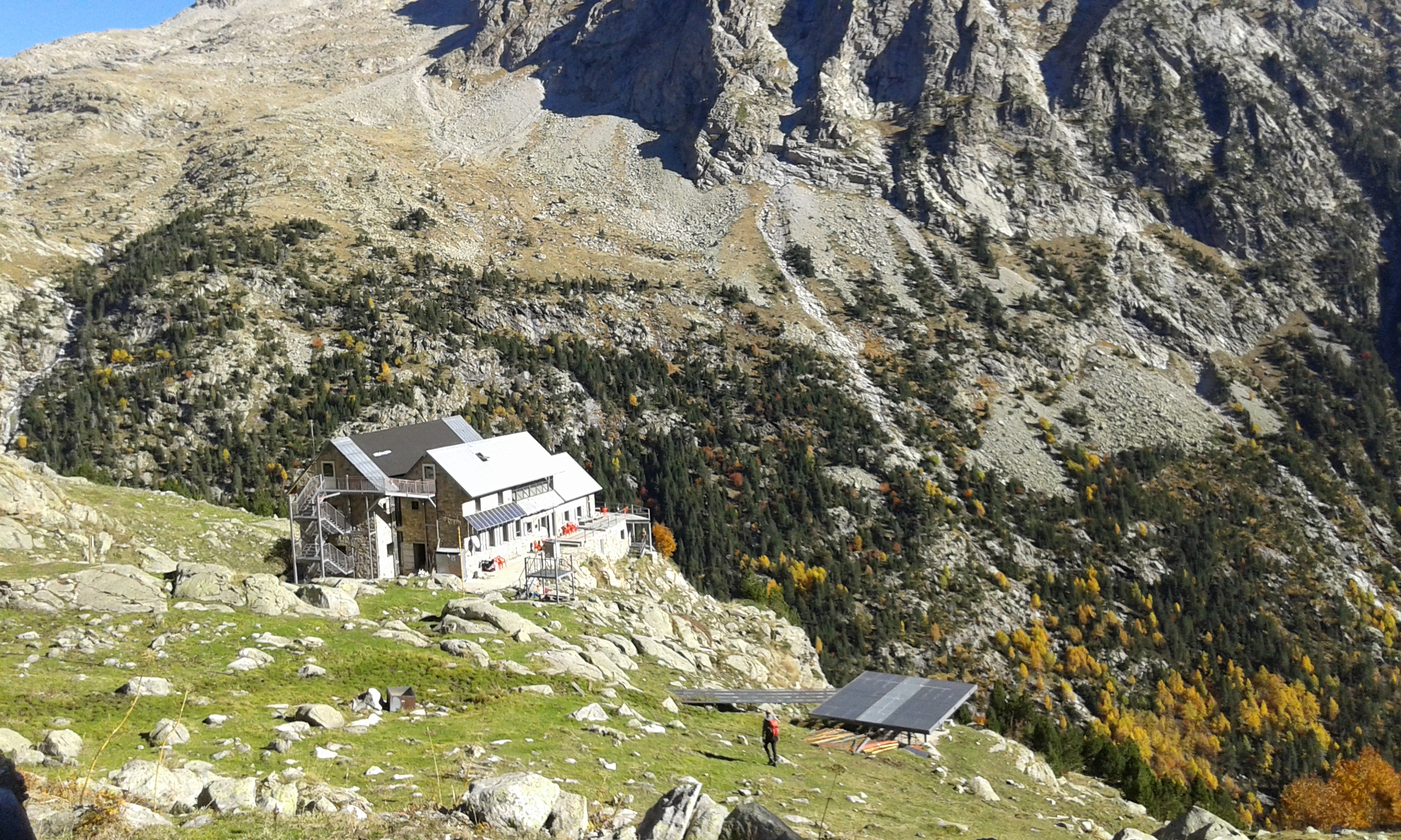 Refugi Ángel Orús, L’Aigüeta de Grist